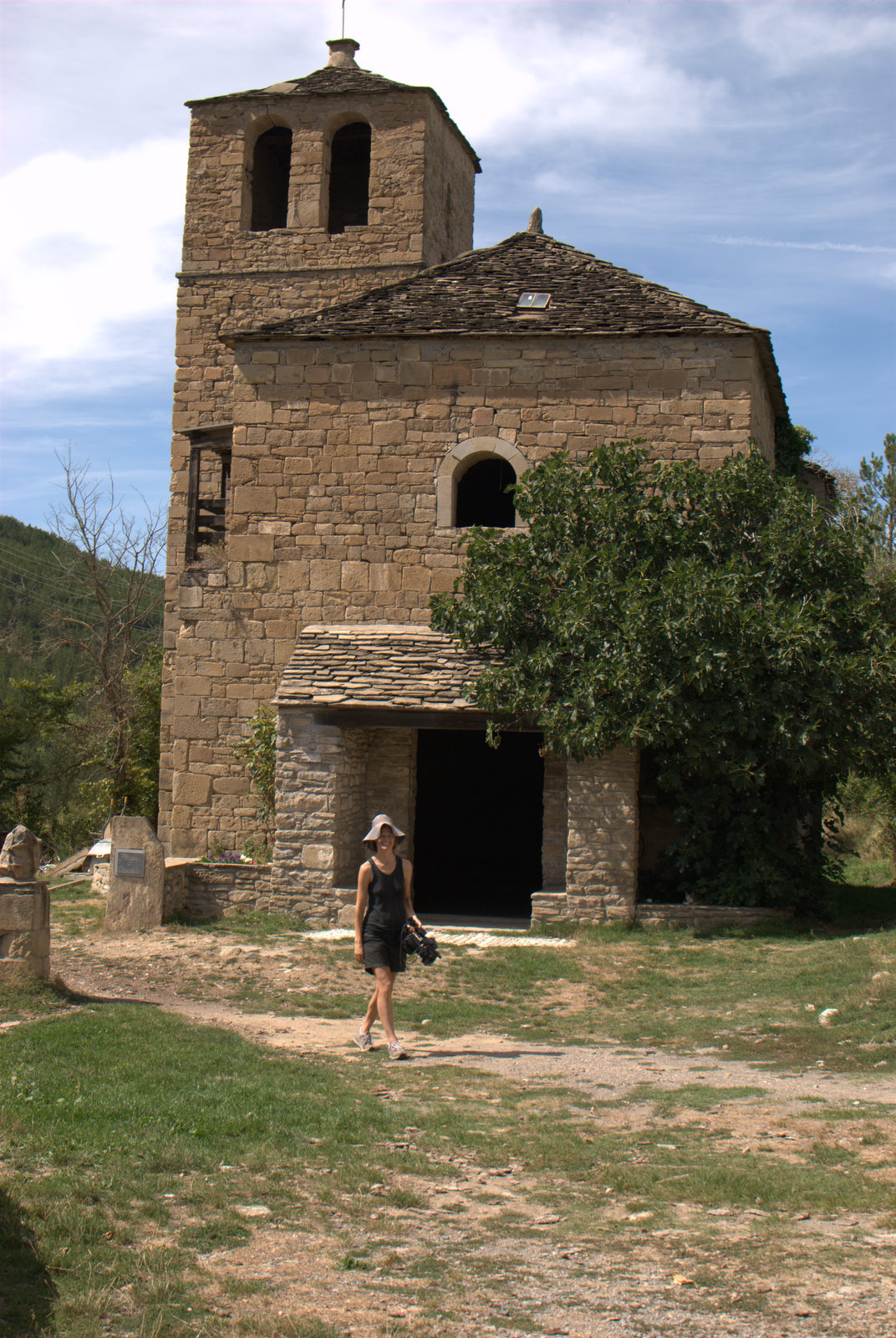 Ibort, provincia de Huesca, Aragón, España.